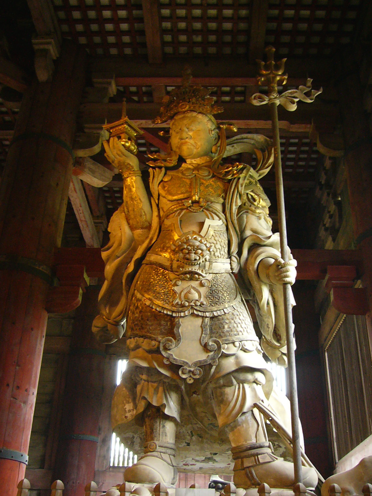 多聞天像，江戸時代，木造，東大寺金堂内東北隅（奈良県奈良市）